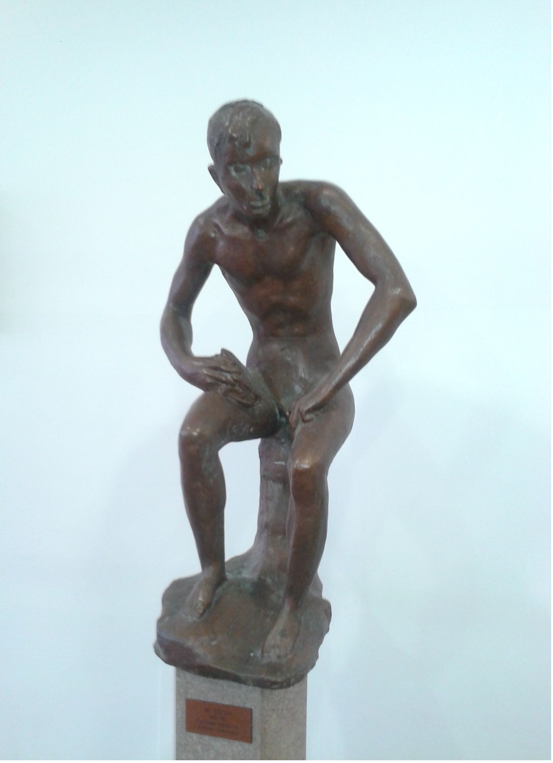 Bronze-Plastik "Lesender Jüngling" von Ivo Beucker (1963), Standort: 1. Obergeschoss Humboldt-Gymnasium, Düsseldorf